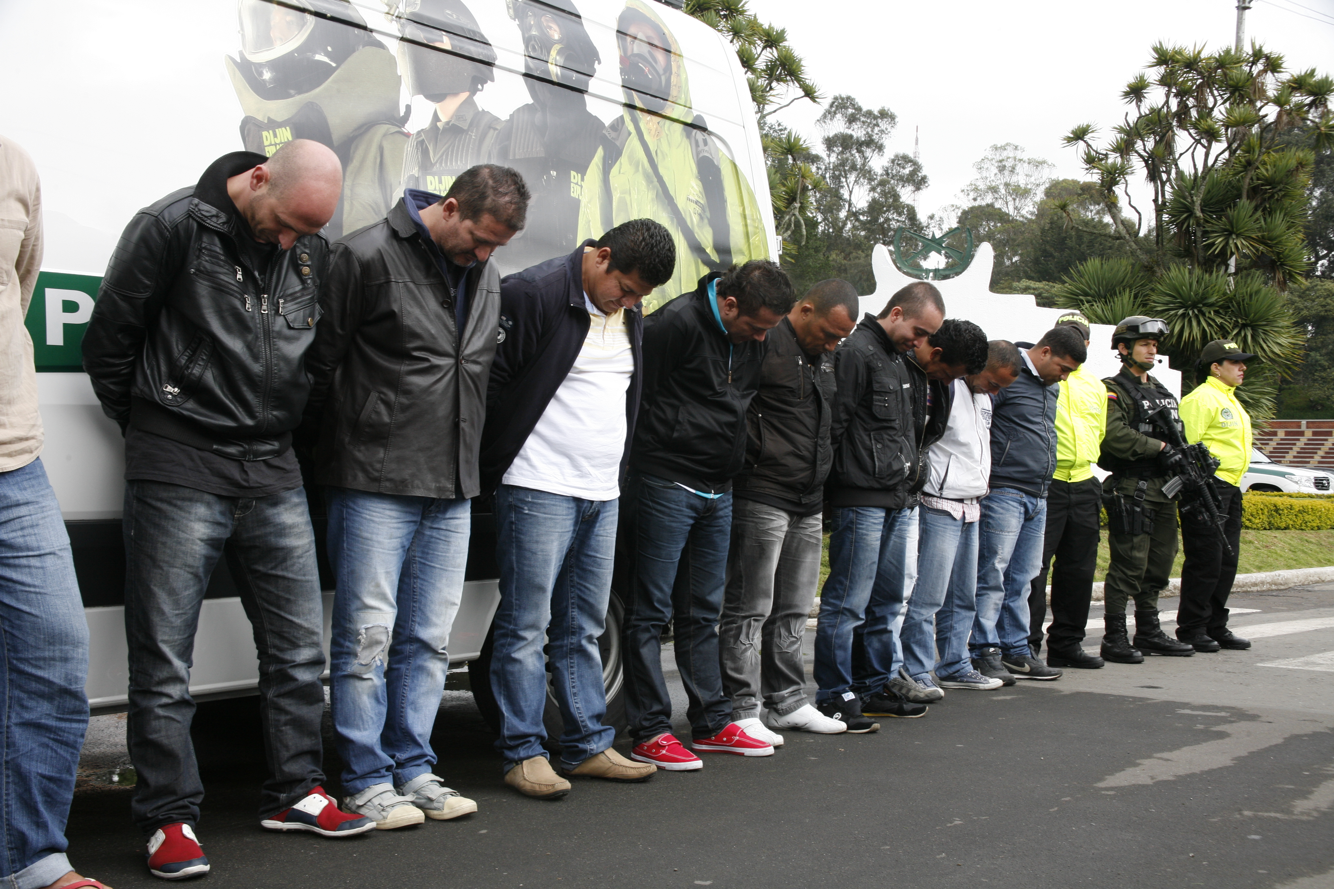 Utilizaban para el transporte de la droga veleros desde la costa de Cartagena hacia Estados Unidos, cargamentos llegaban a Honduras como país de tránsito Bogotá. En desarrollo de los objetivos propuestos dentro de la Política Nacional de Seguridad y Convivencia Ciudadana (PNSCC) y el marco estratégico institucional, la Dirección de Investigación Criminal e INTERPOL capturó en desarrollo de una operación de alto impacto, doce personas requeridas en extradición por Estados Unidos por delitos relacionados con narcotráfico.